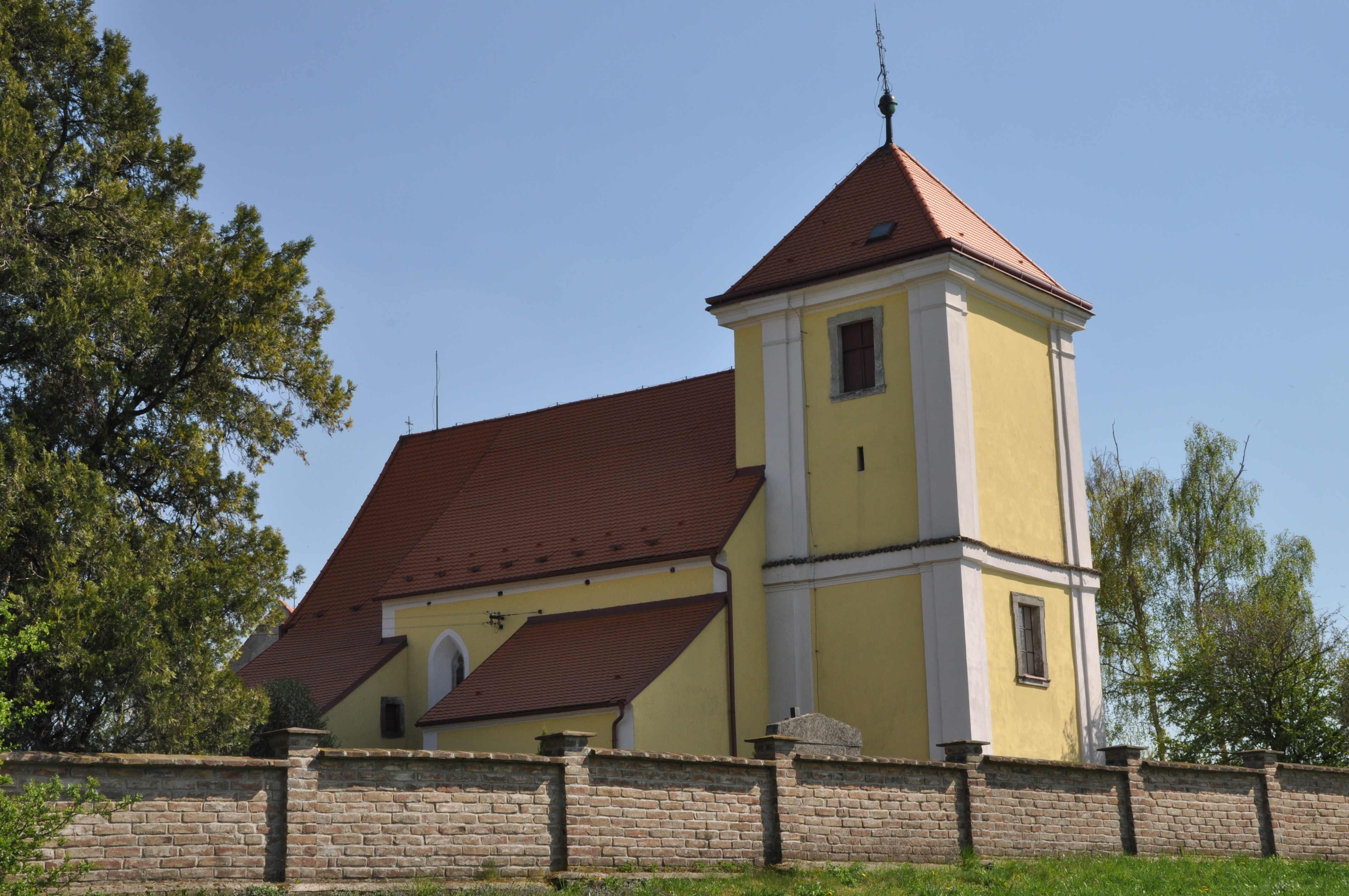 Kostel Povýšení svatého Kříže v Honbicích, okres Chrudim